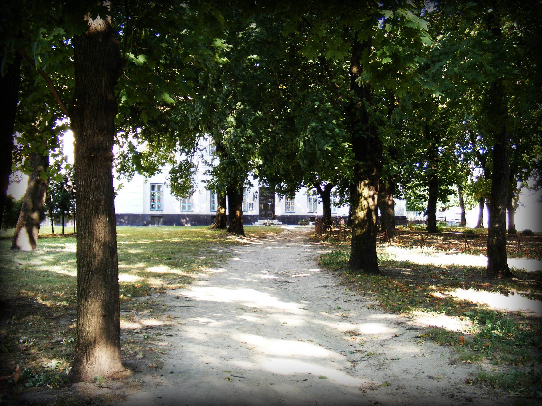 Kép a kastély előtti parkból, saját fotó